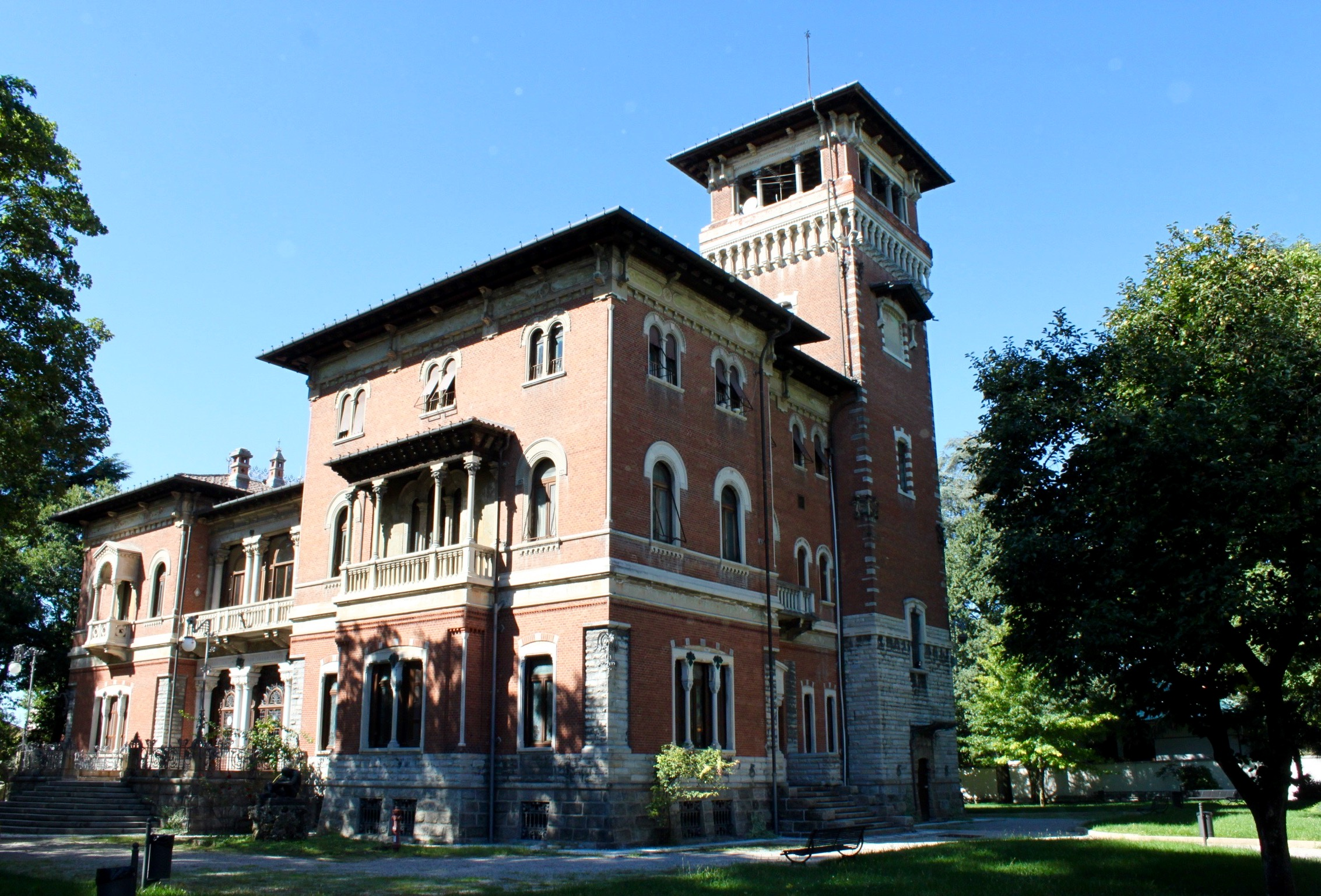 Villa Ottolini-Tosi This is a photo of a monument which is part of cultural heritage of Italy.